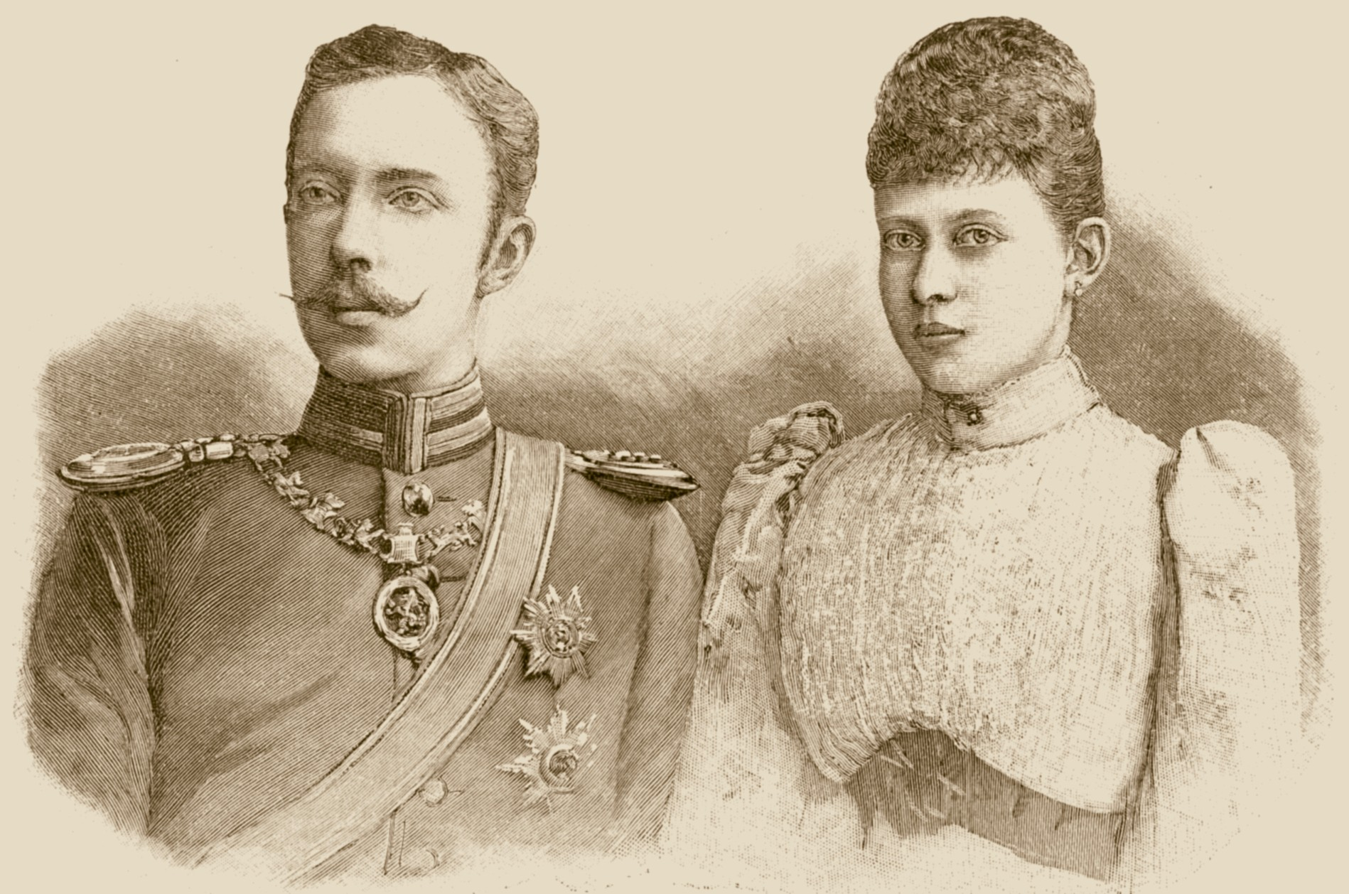 Prinzessin Margarethe von Preußen und Prinz Friedrich Karl von Hessen